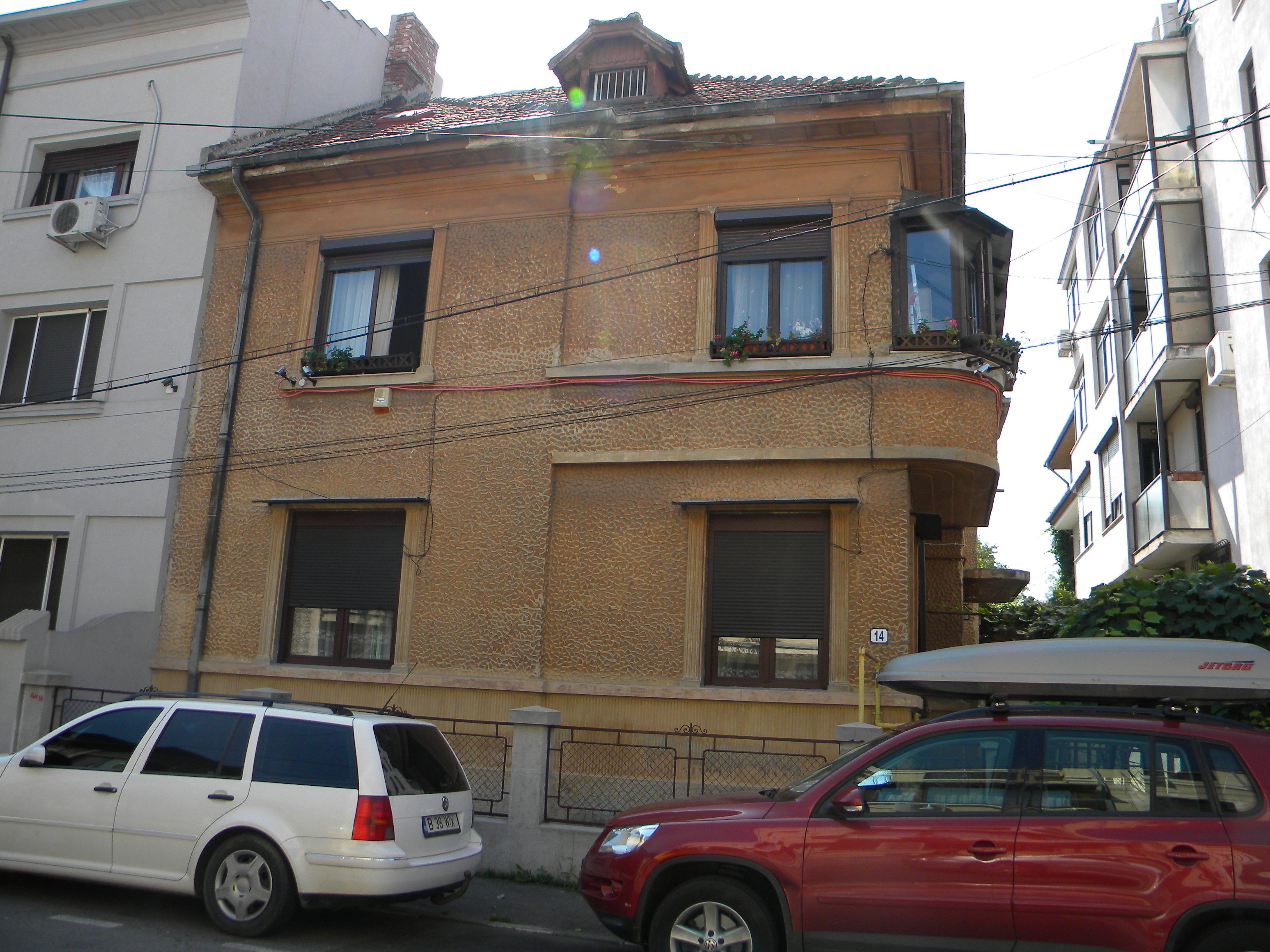 Bucuresti, Romania, Imobilul nr. 14 de pe Str. Naum Ramniceanu; B-II-m-B-19533